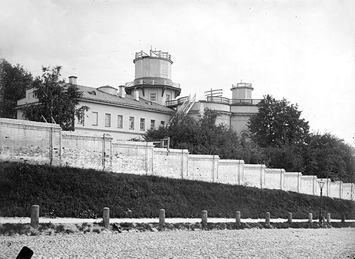 Внешний вид здания обсерватории. Казань.